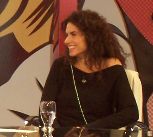 Florencia Raggi en el programa Dejámelo pensar, de Boy Olmi y Sandra Russo, en la TV Pública (Buenos Aires). Agradecimientos: Hugo Barcia, subgerente de Relaciones Institucionales y Prensa, del Canal 7 Argentina (Buenos Aires).